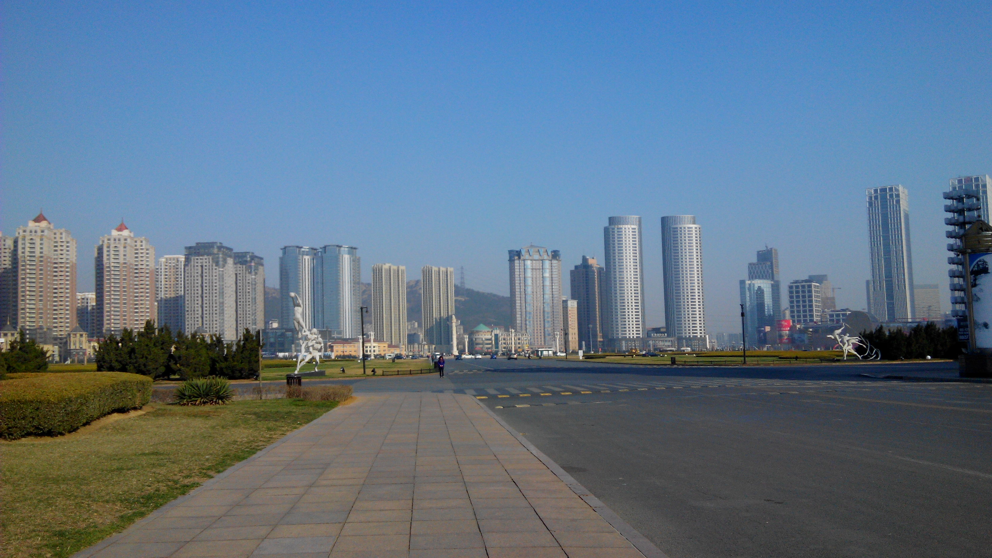 星海广场东南角